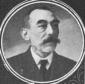 Alejandro Mon Landa, fotografía en Vida Gallega 1915